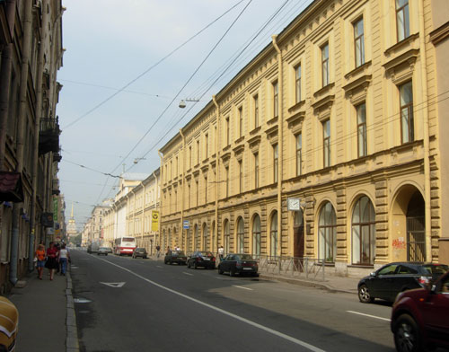 211 школа Санкт-Петербурга, август 2008 г.